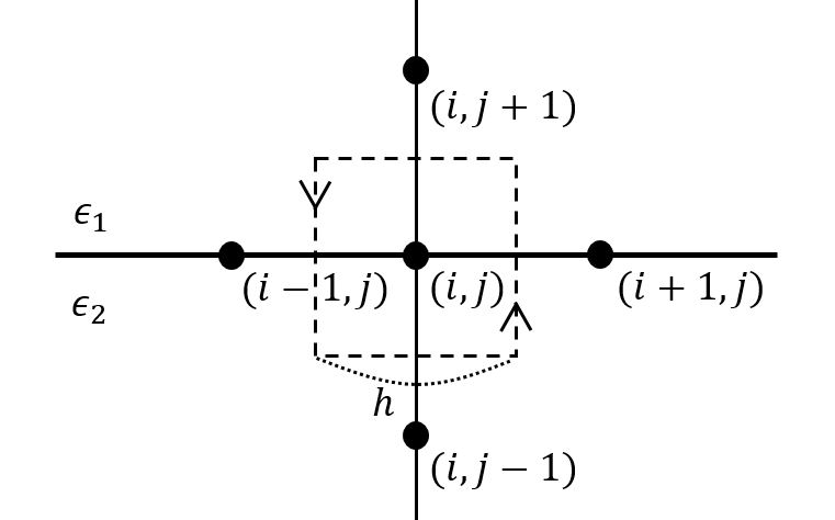 서로 다른 유전체 사이에서의 격자점이다.